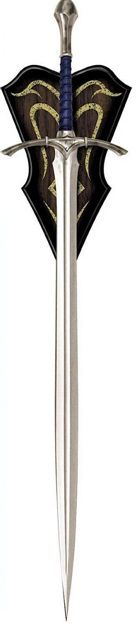 Меч Гламдринг из фильма "Властелин Колец"